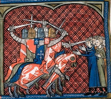 Le massacre des Albigeois, chronique de Saint-Denis, XIVème siècle, Londres, British Library.